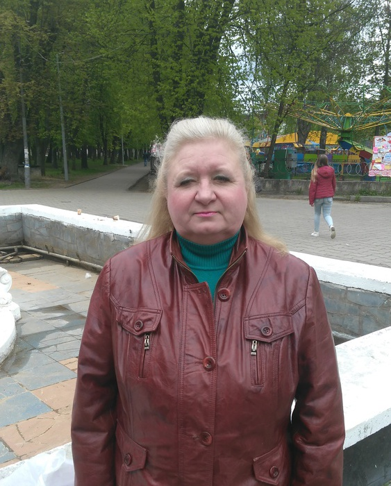 Поетеса Марія Мохналь